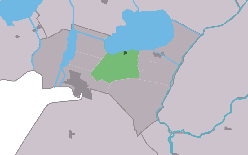 Kaartsje fan himrik fan Eastersee